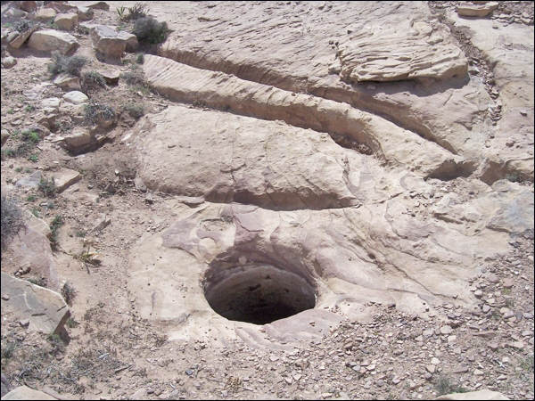 Une citerne construite par les nabatéens, avec les rigoles d’amenées de l’eau creusées dans le rocher.